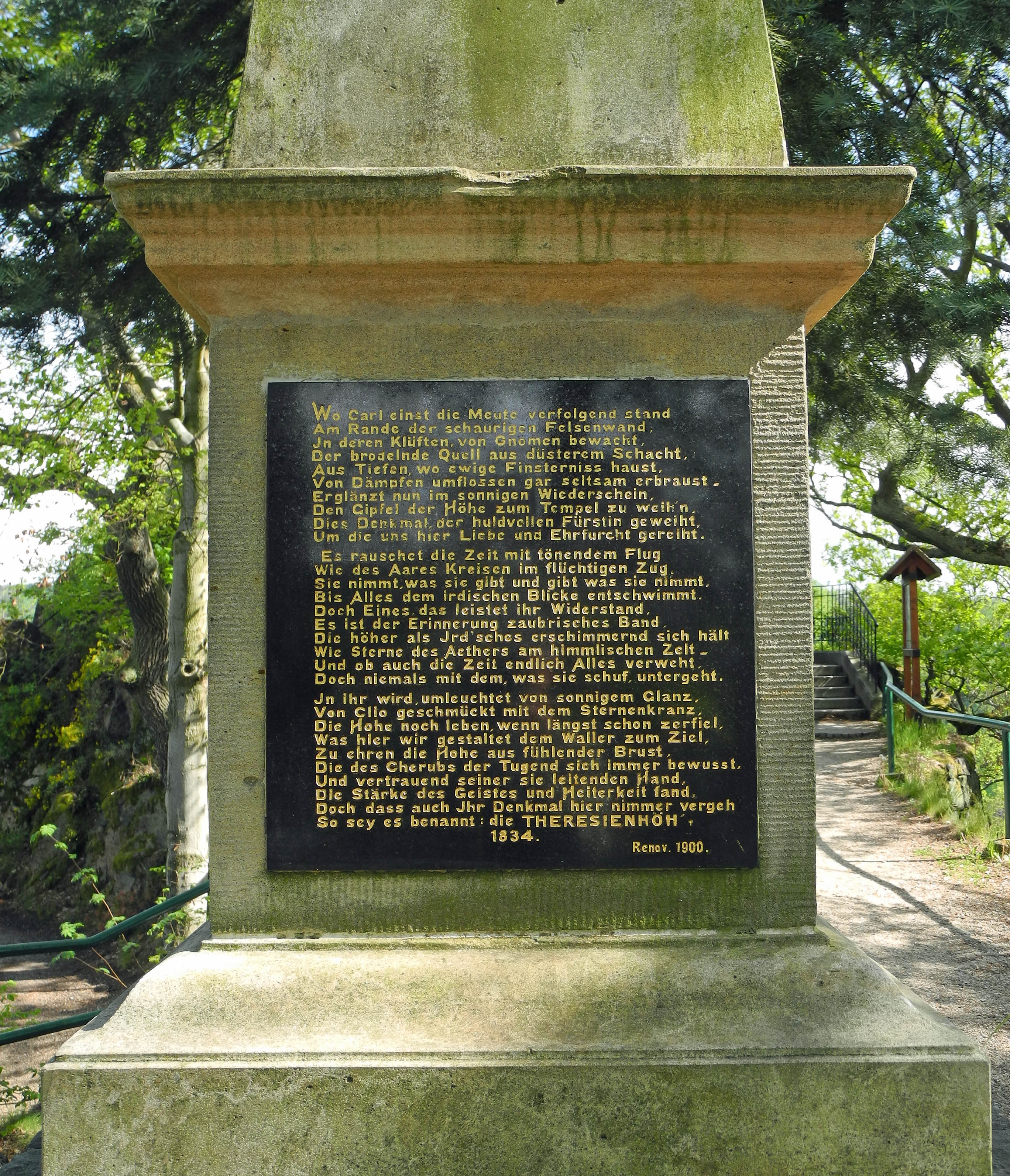 Gedenktafel am Denkmal auf der Theresienhöhe oberhalb von Karlsbad (Karlovy Vary), benannt nach Marie Thérèse Charlotte von Frankreich (1778–1851), die Karlsbad 1834 besuchte